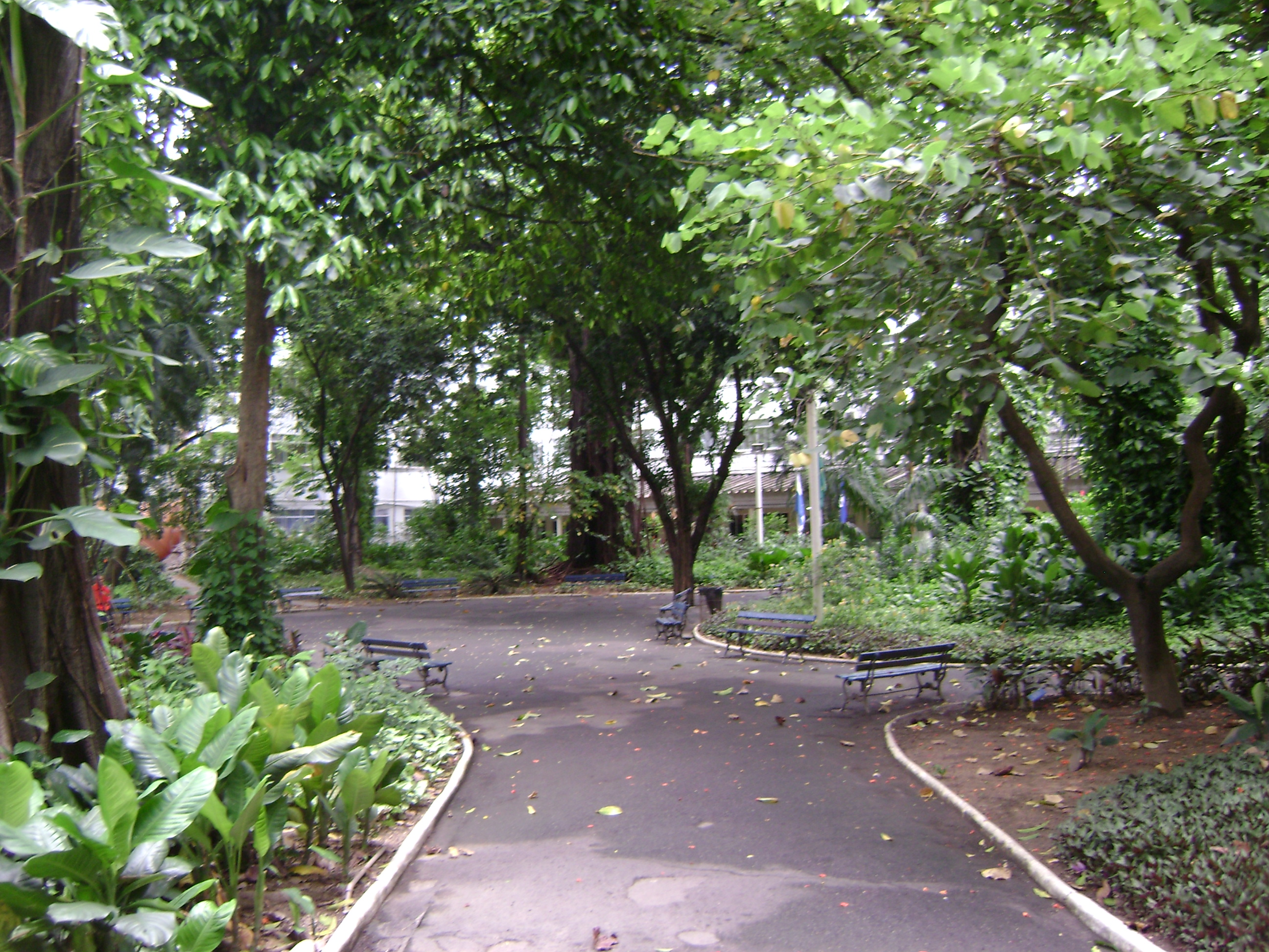 Pátio central do Cefet/RJ.